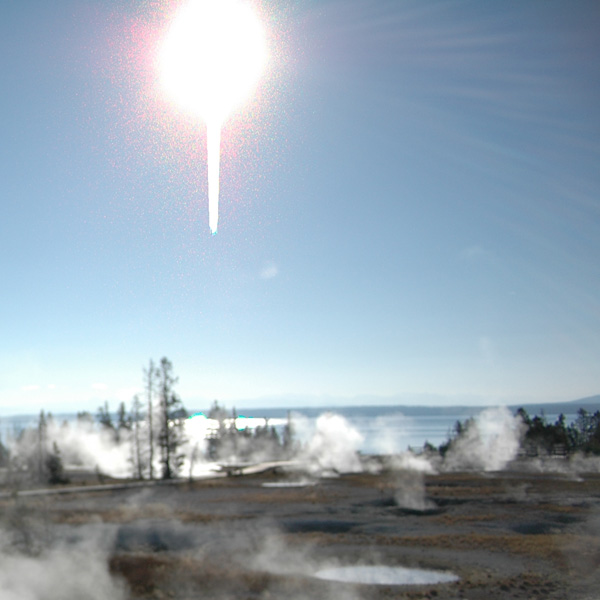 Blooming CCD